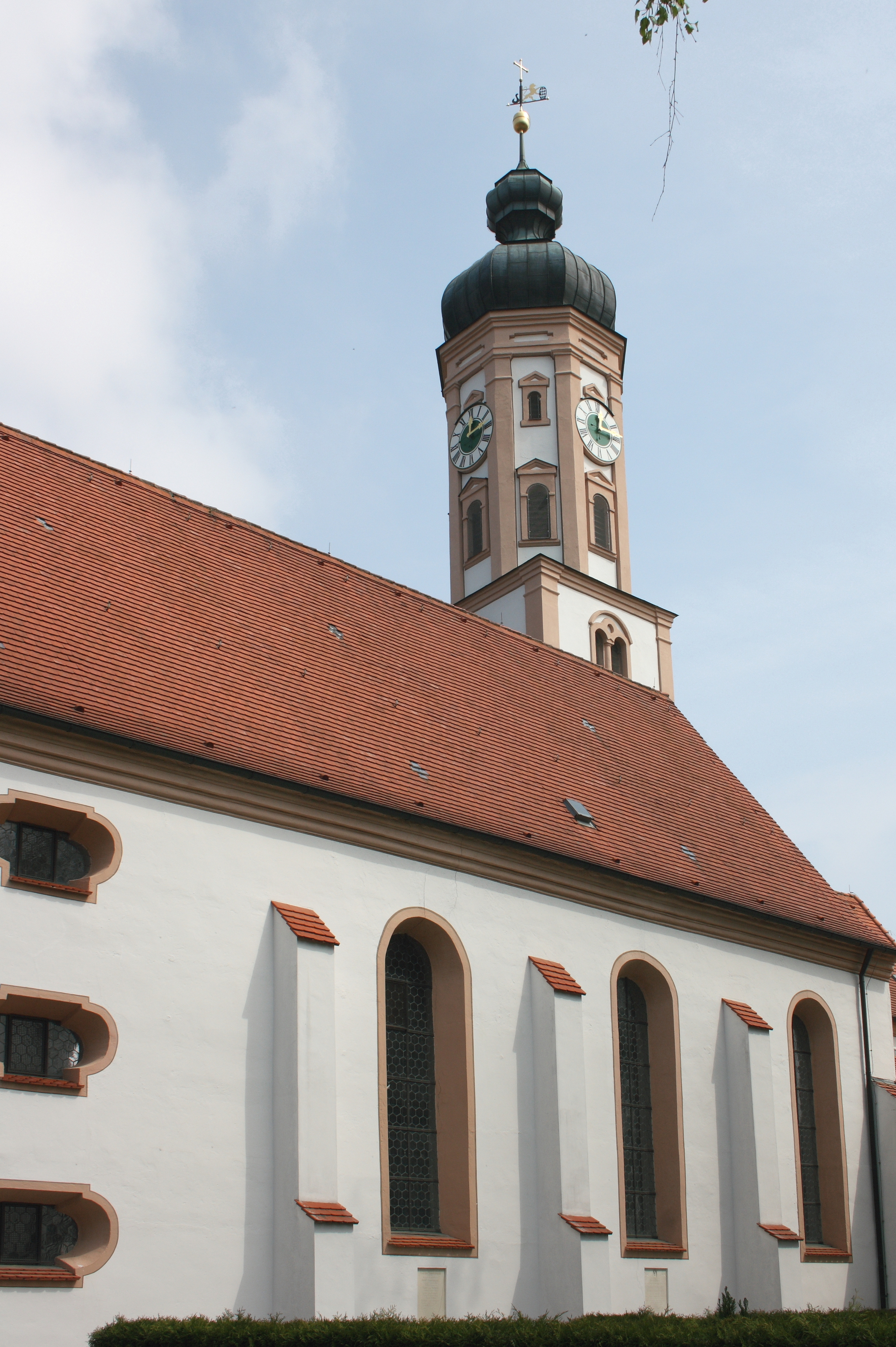 Katholische Pfarrkirche St. Martin in Horgau, einer Gemeinde im Landkreis Augsburg (Bayern), Ansicht von Südwesten